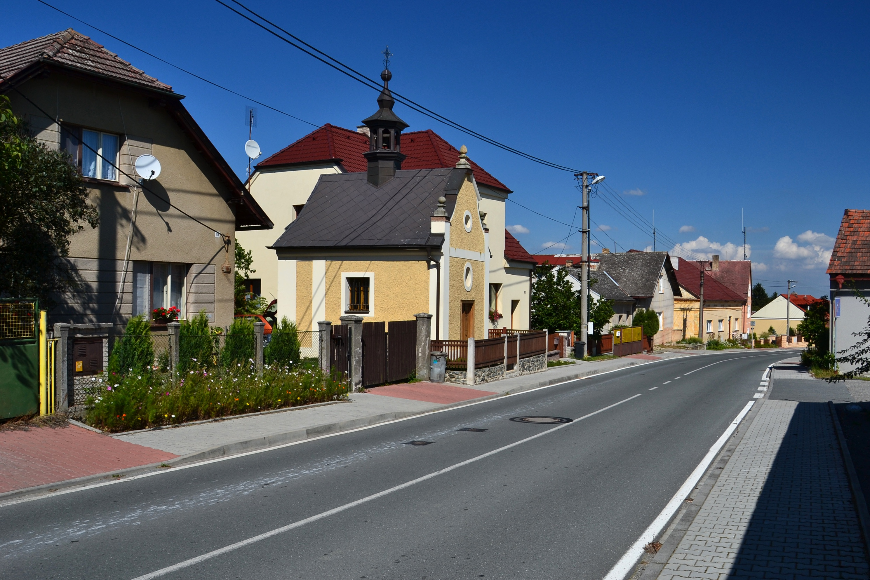 Horní Bělá - střed obce